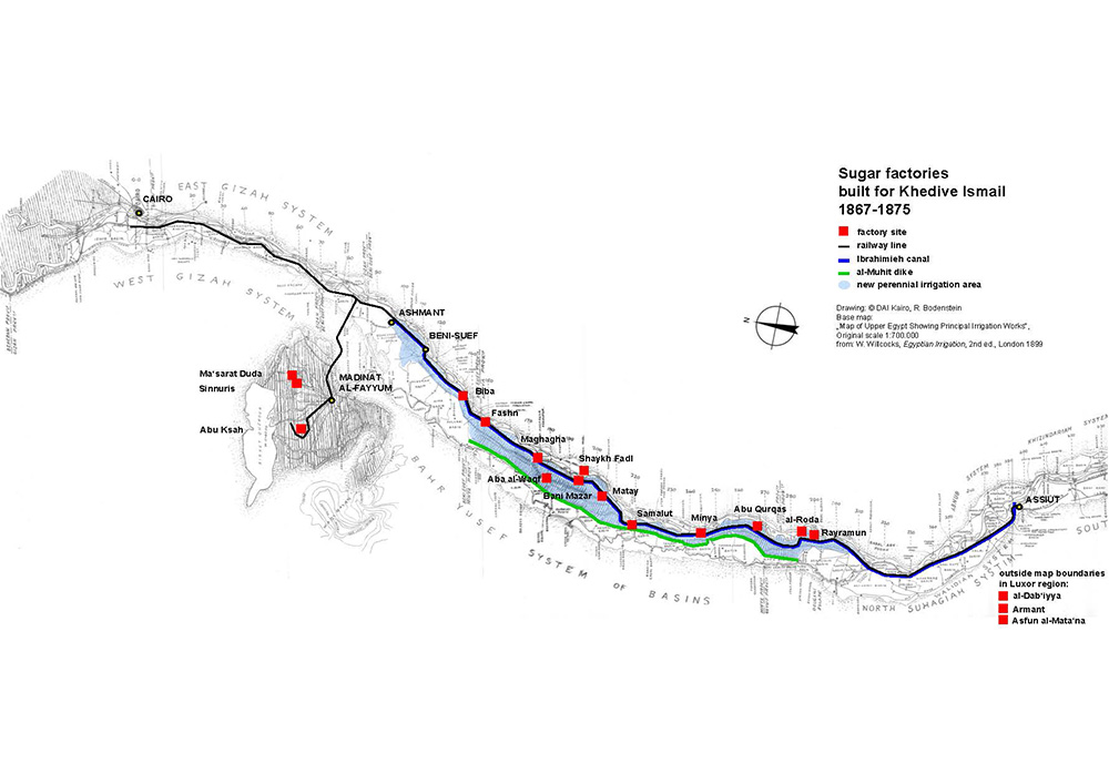 خريطة لوادي النيل بين القاهرة وأسيوط تشير إلى مواقع مصانع السكر التي بنيت لخديوي إسماعيل ، 1867-1875.